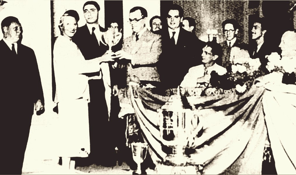 Membros do Automóvel Clube do Brasil entregam à corredora Hellé Nice um troféu por sua participação no Grande Prêmio Cidade do Rio de Janeiro, 1936.